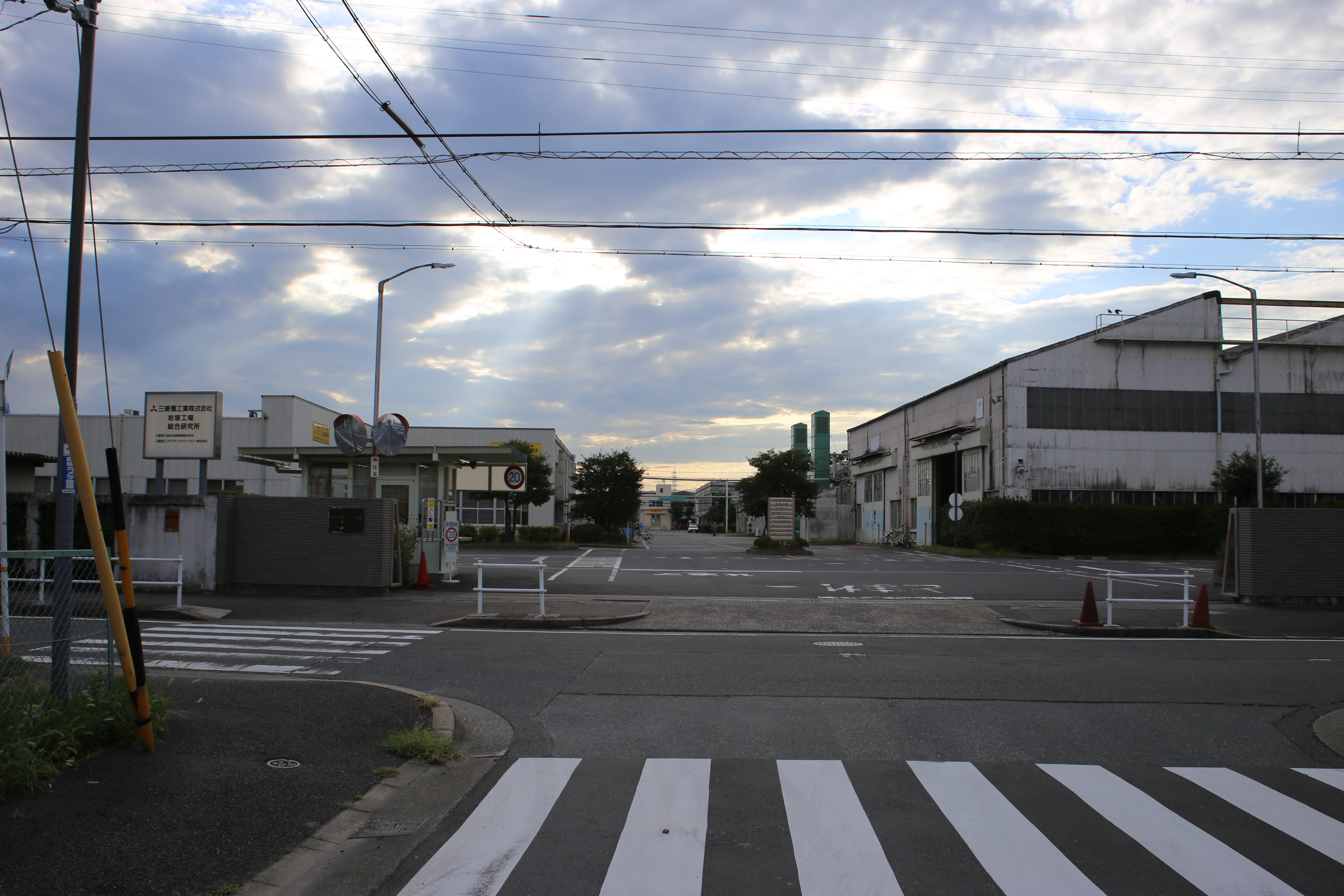 名古屋市中村区岩塚町の三菱重工業岩塚工場入口を東側より撮影